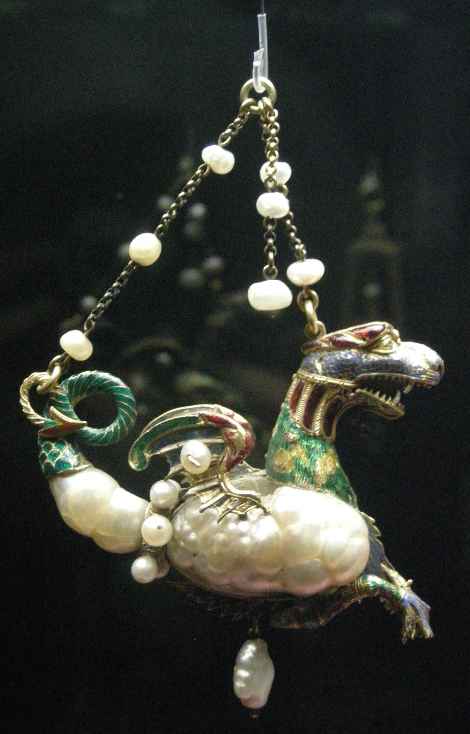 Arte del XVIII sec, ninnoli a forma di drago